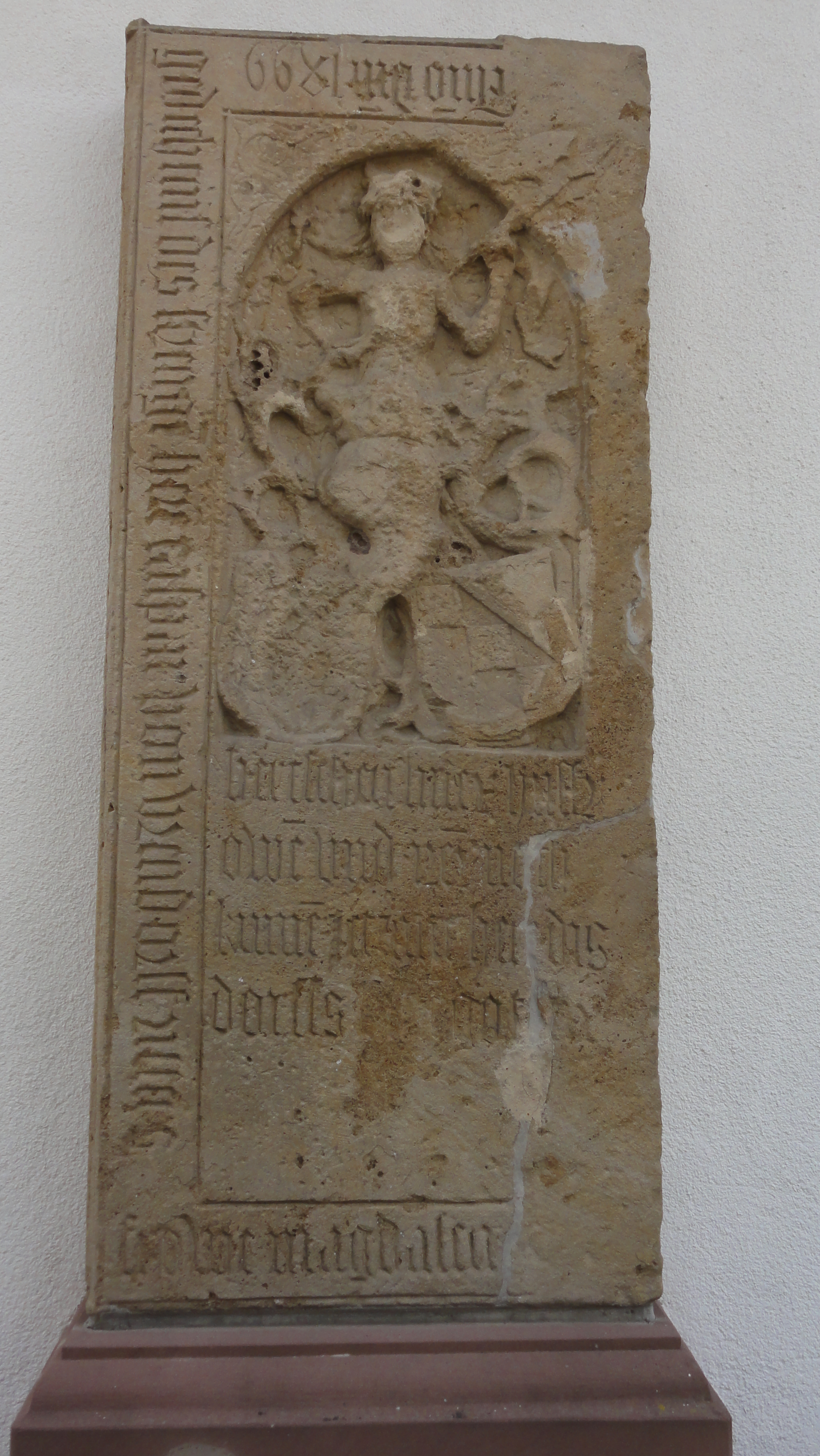 Alsace, Bas-Rhin, Ernolsheim-Bruche, Chapelle votive du cimetière (1857): . Dalle funéraire de Magdalena Ritter von Urendorf (1499)